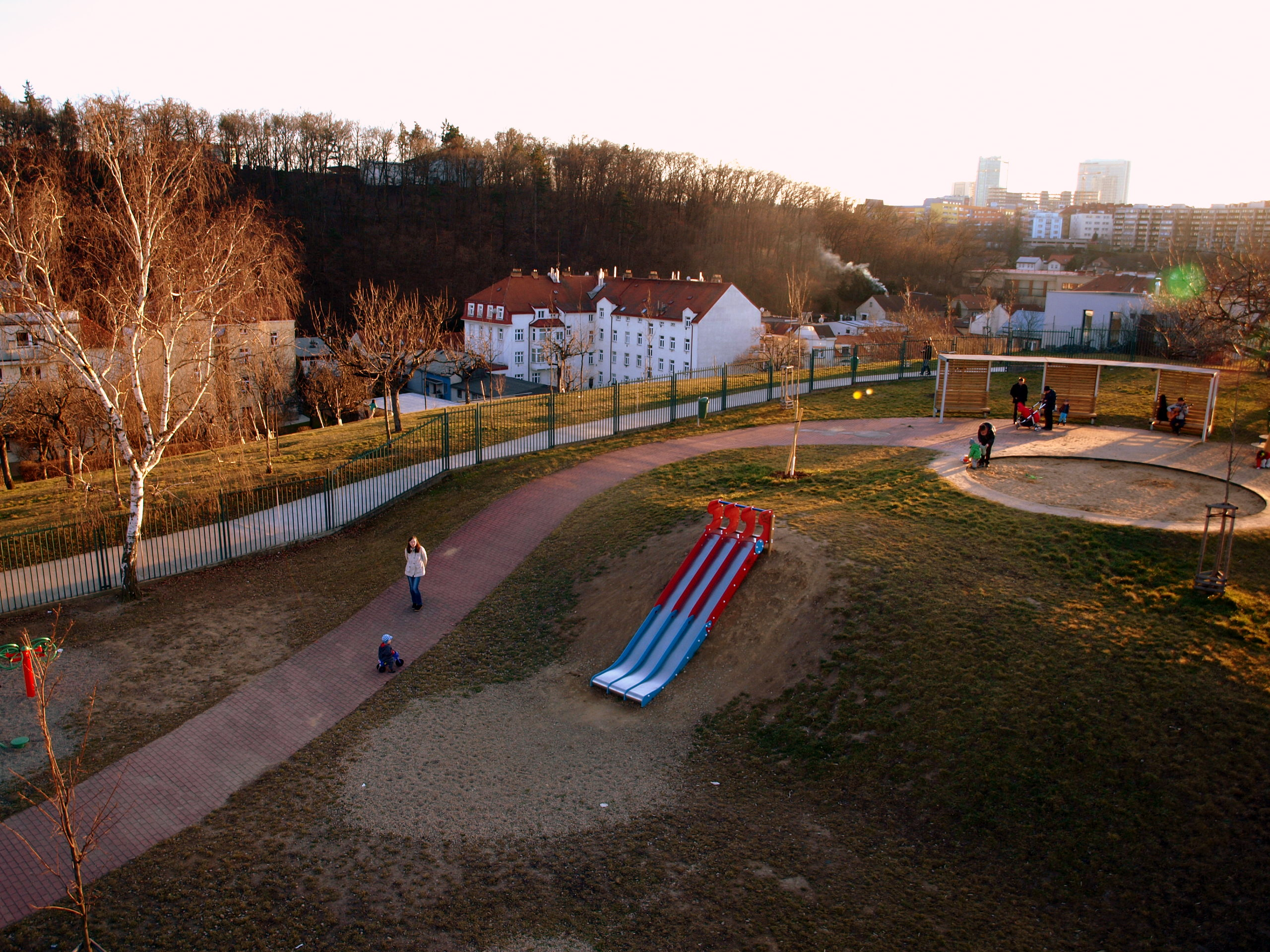 Pražský vrch Kapitol, dětské hřiště a Tyršův vrch v pozadí.